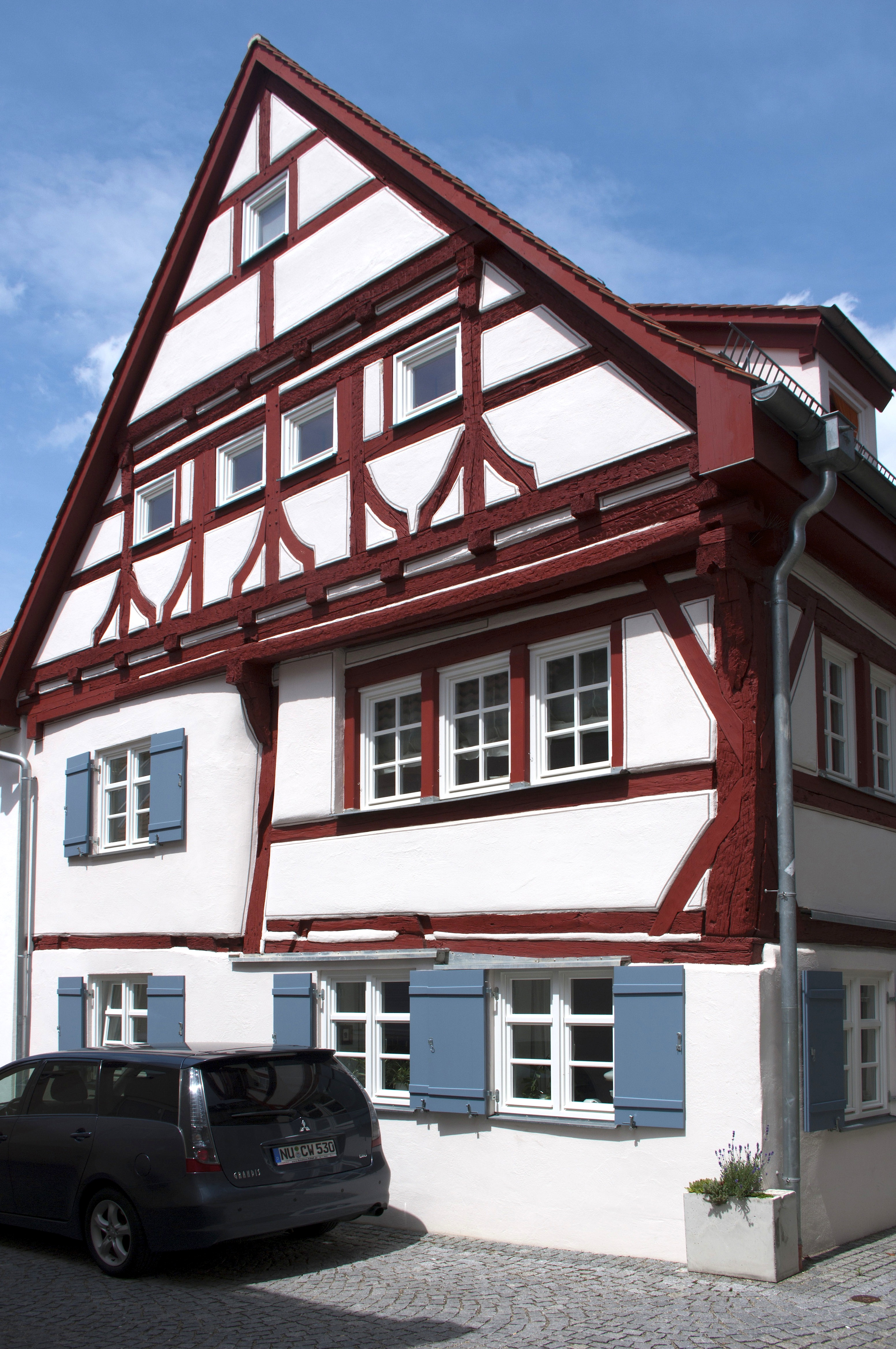 Wohnhaus mit Fachwerk, ca. 1430 (Dendro). Zusammengebaut mit Mariengasse 1